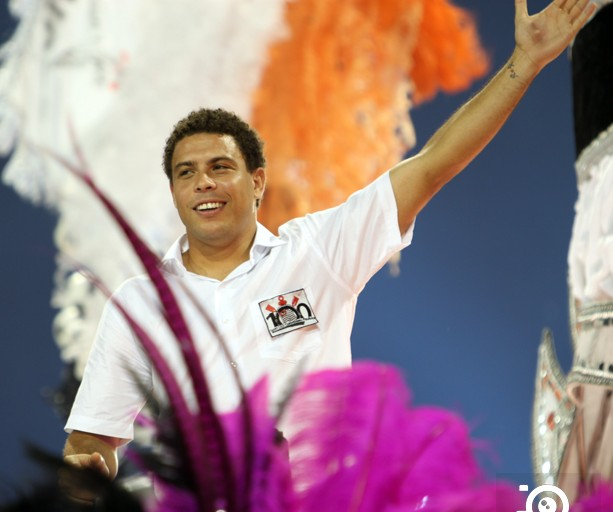 Ronaldo